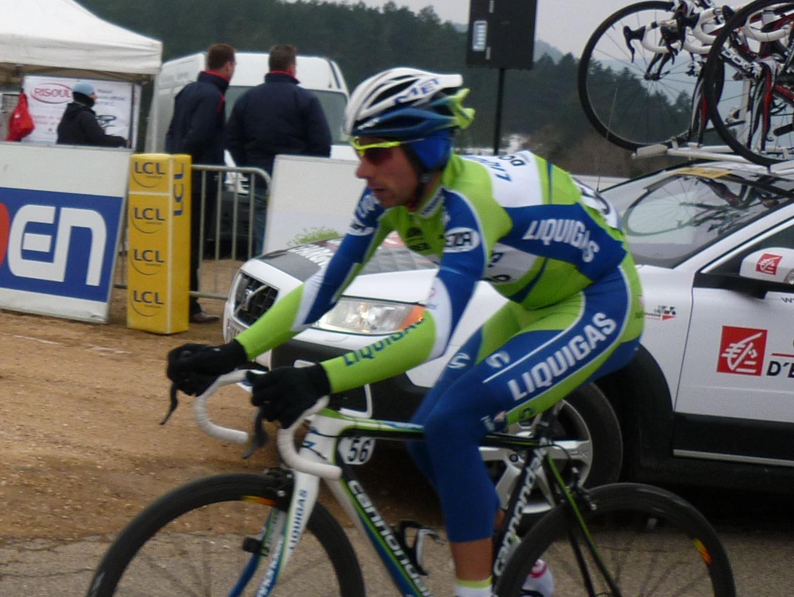 Le coureur cycliste italien Ivan Santaromita (Liquigas) lors de la 4e étape du Paris-Nice 2010. Photo prise à Mende en mars 2010.